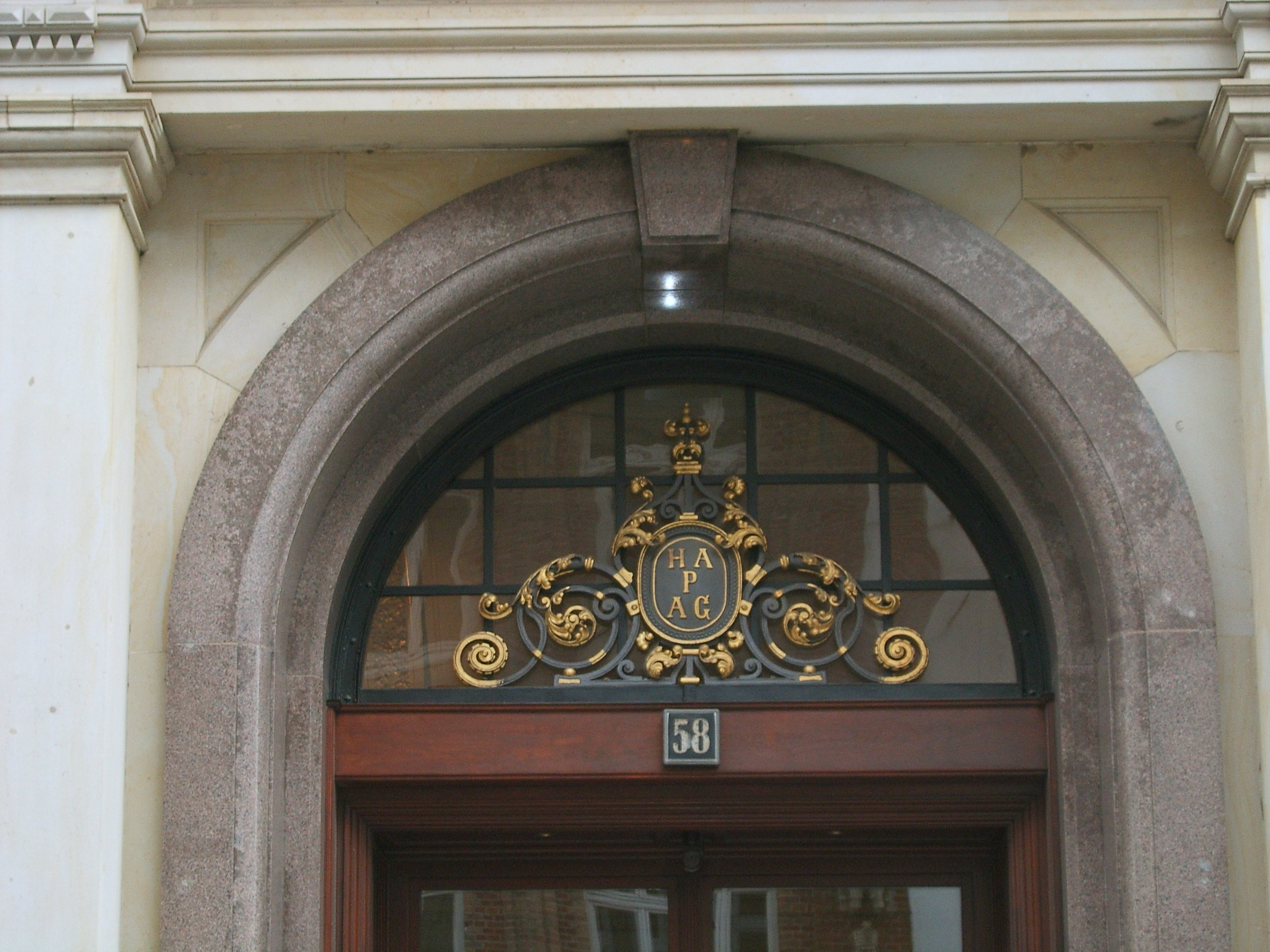 Rückwärtiger Eingang des HAPAG-Hauses in der Ferdinandstraße 58 in Hamburg-Altstadt. Das Haus wurde 1901 bis 1903 von Martin Haller errichtet und 1912 bis 1923 von Fritz Höger erweitert. Der hier abgebildete Gebäudeteil gehört zum Hallerschen Altbau.